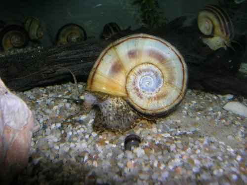 Paradiesschnecke (Marisa cornuarietis).